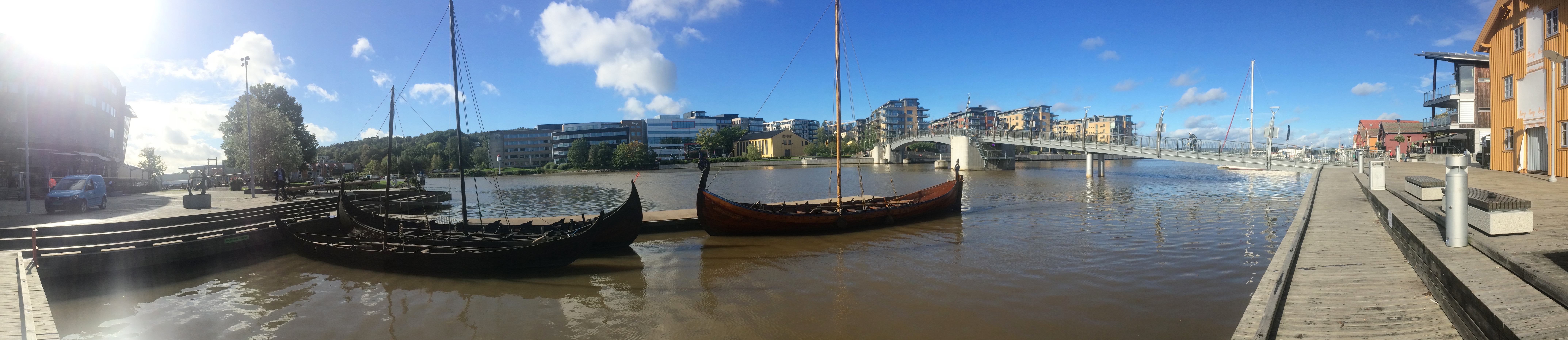 Små, rekonstruerte langskip (vikingskip) fra norsk middelalder utenfor Oseberg kulturhus/hotell ved brygga i Tønsberg i Vestfold 25. september 2015. Byfjorden er del av Tønsbergfjorden. Kaldnes bro mellom byen og Nøtterøy-sida åpnet i 2005. Beskåret, fortegnet panoramabilde.